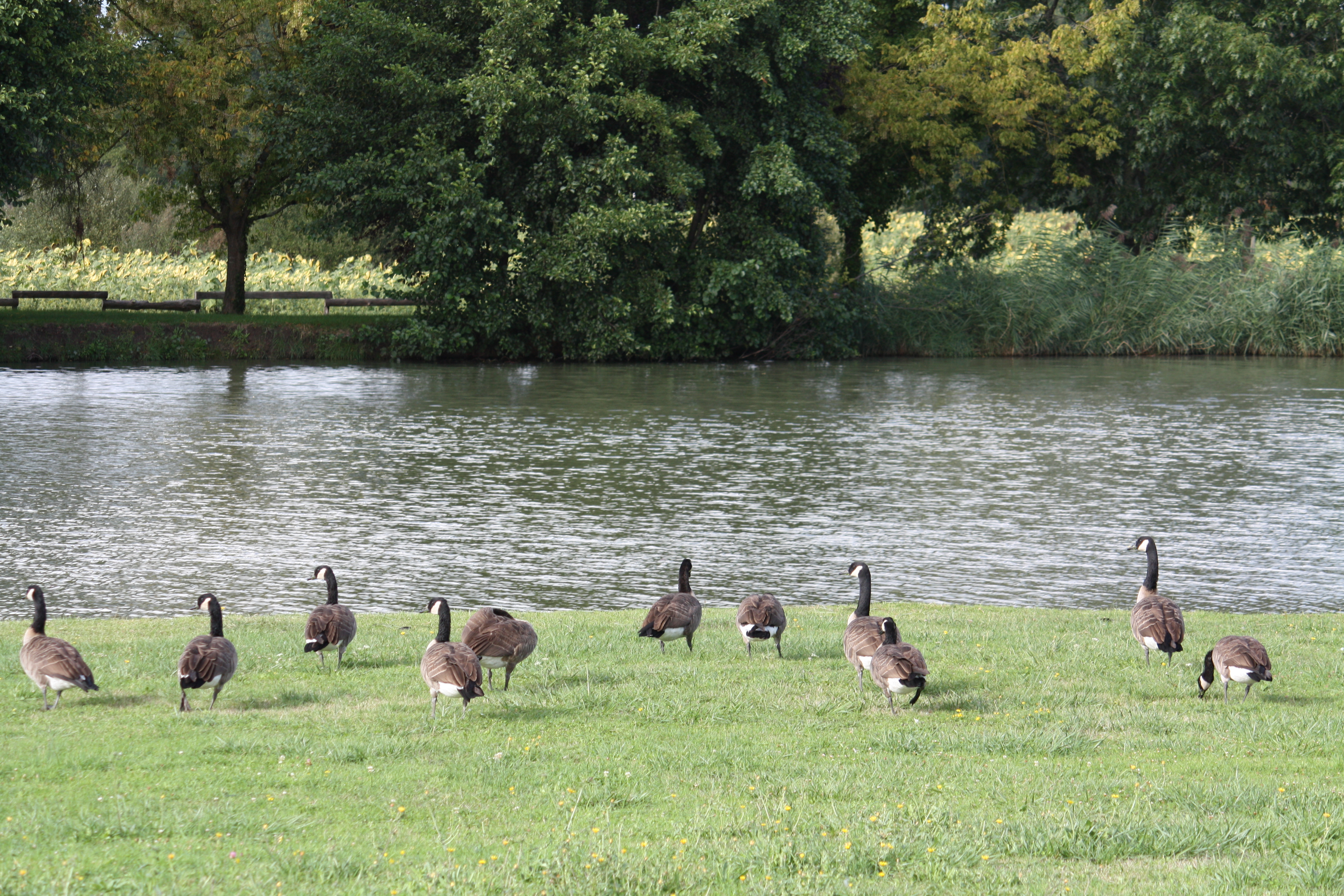 Au bord du lac Claude ARFEL, les oies se préparent pour la grande migration.